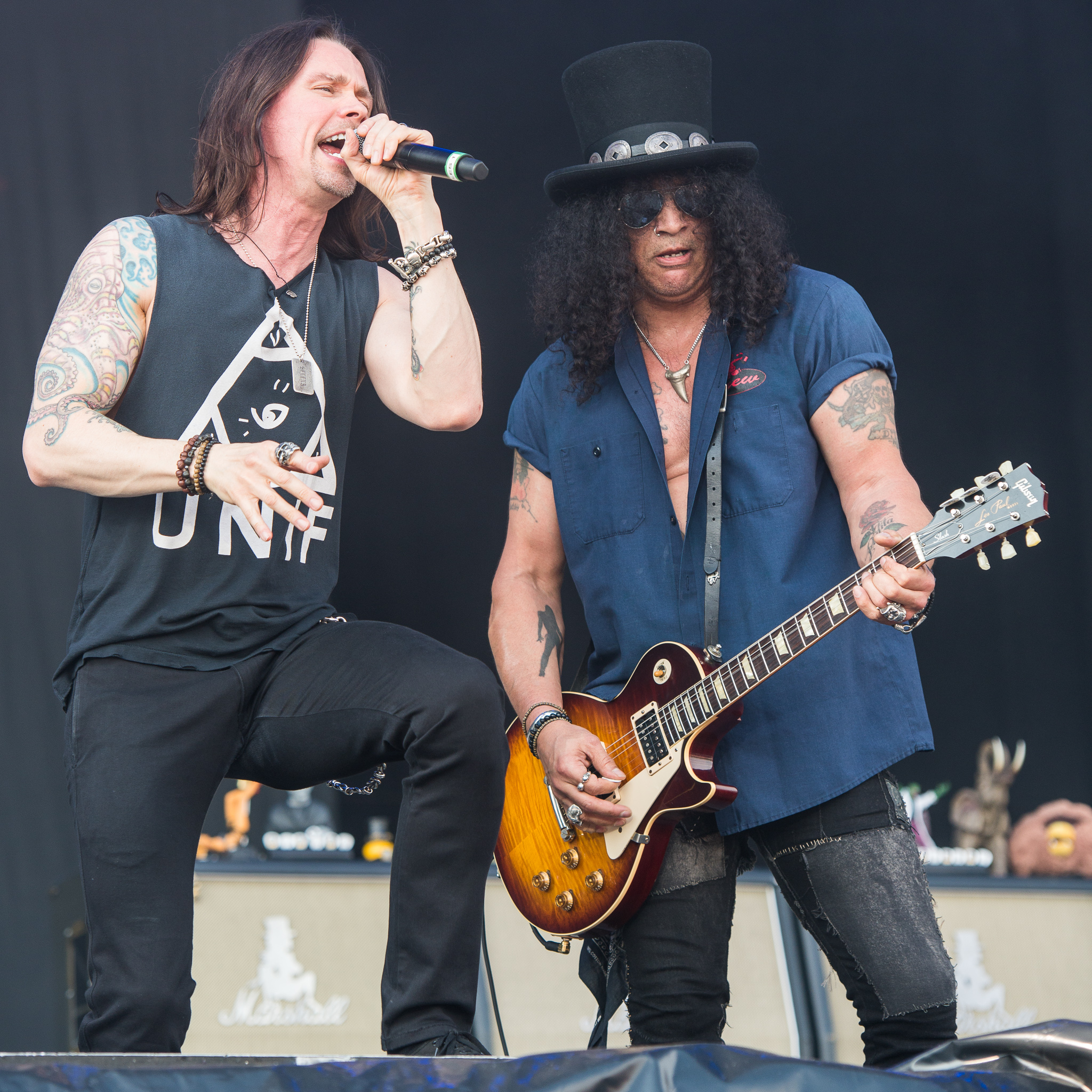 ARGO-Konzerte,Festival,Konzert,Livekonzert,Livemusik,Musik,Myles Richard Bass,RiP,Rock im Park 2015,Saul Hudson,Seat Zeppelin Stage,Slash feat. Myles Kennedy & The Conspirators